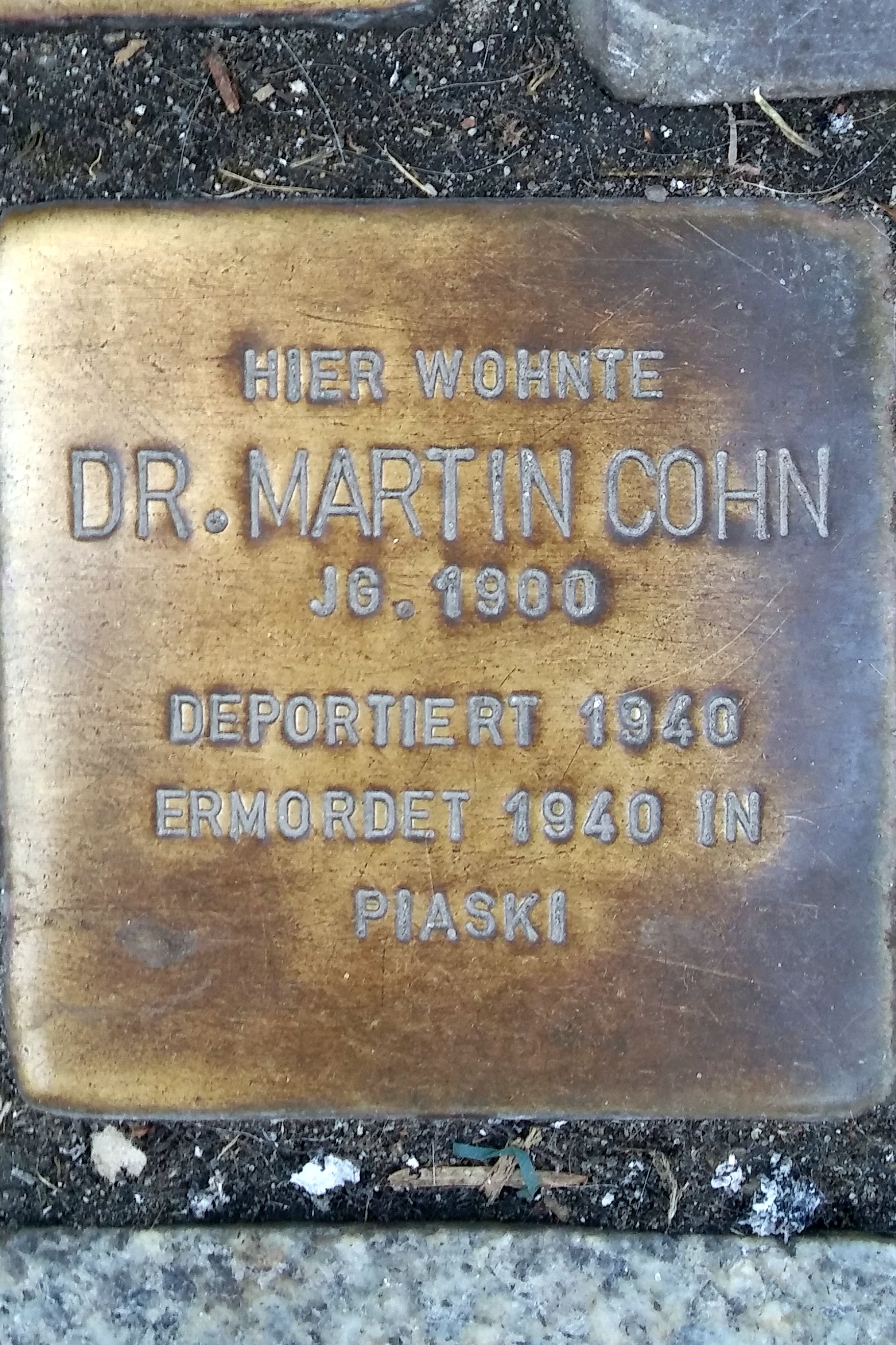 Stralsund, Mönchstraße 37, Stolperstein Martin Cohn